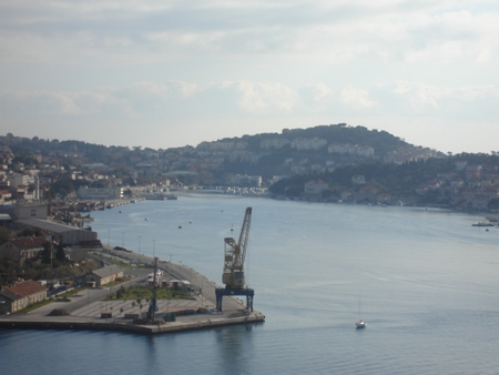 Luka Gruž - Dubrovnik